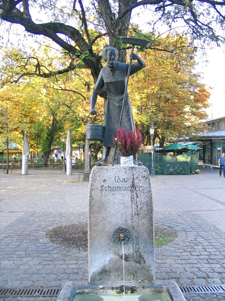 Ida-Schumacher-Brunnen auf dem Viktualienmarkt in München, fotografiert von Ramgeis im Oktober 2004, GNU-FDL